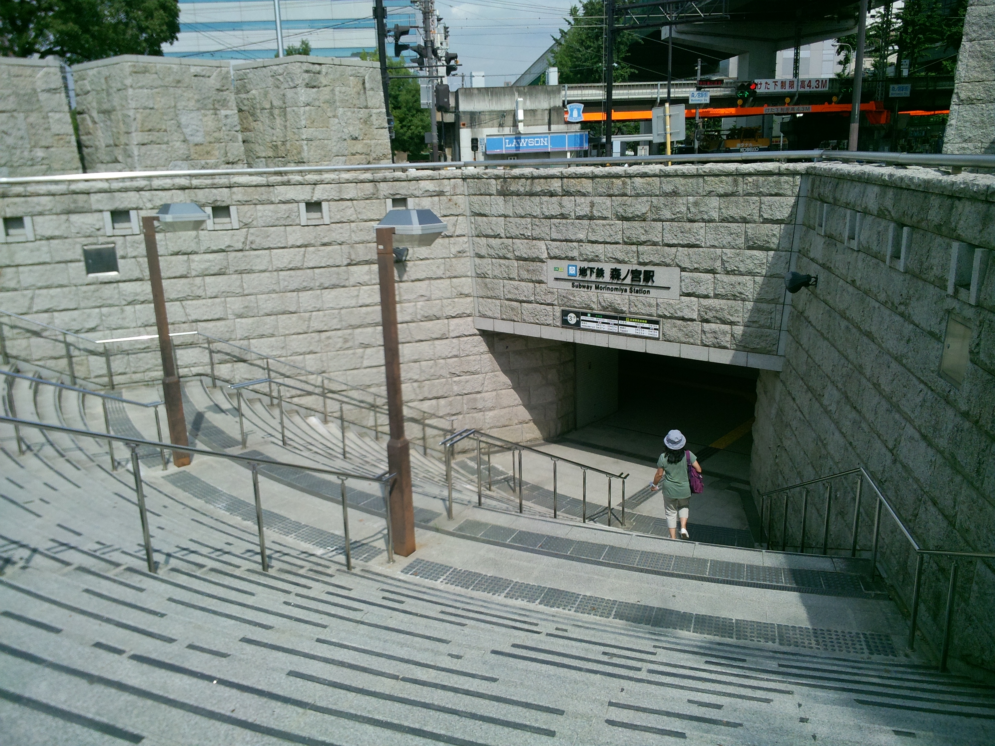 大阪地鐵森之宮站3-B出口